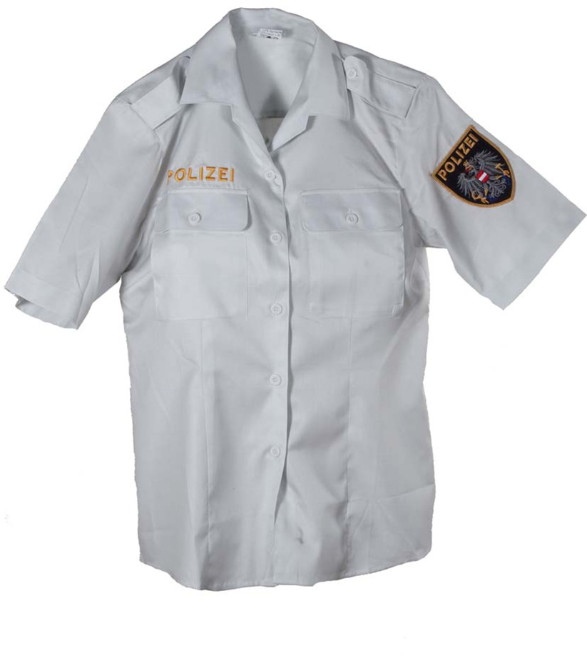 Oberbekleidungssorten der Bundespolizei und des rechtskundigen Dienstes bei den Sicherheitsbehörden Uniformbluse, weiß, Kurzarm